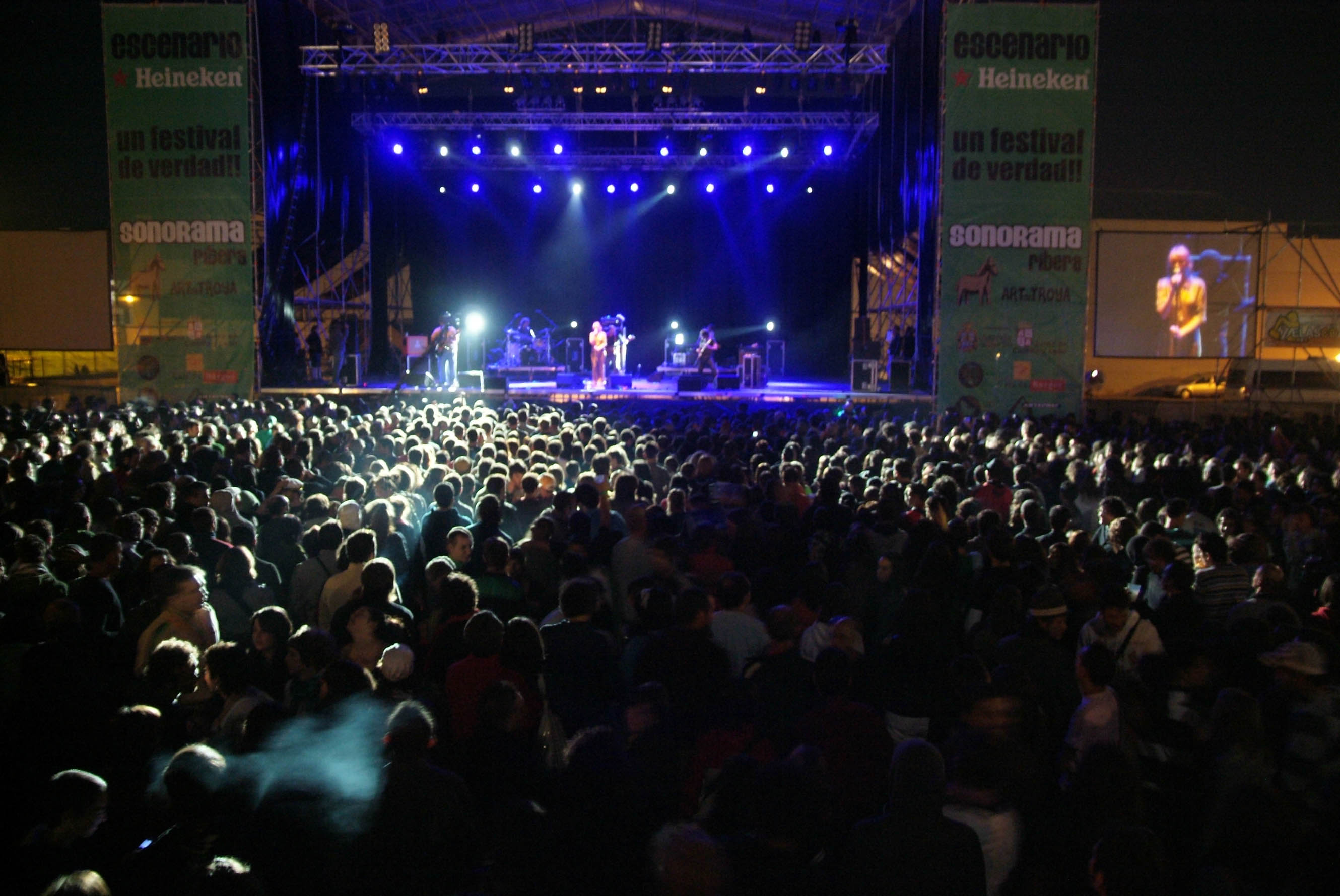 Najwajean : Najwa Nimri y Carlos Jean, durante su actuación en el Festival Sonorama 2008, en Aranda de Duero (Burgos.